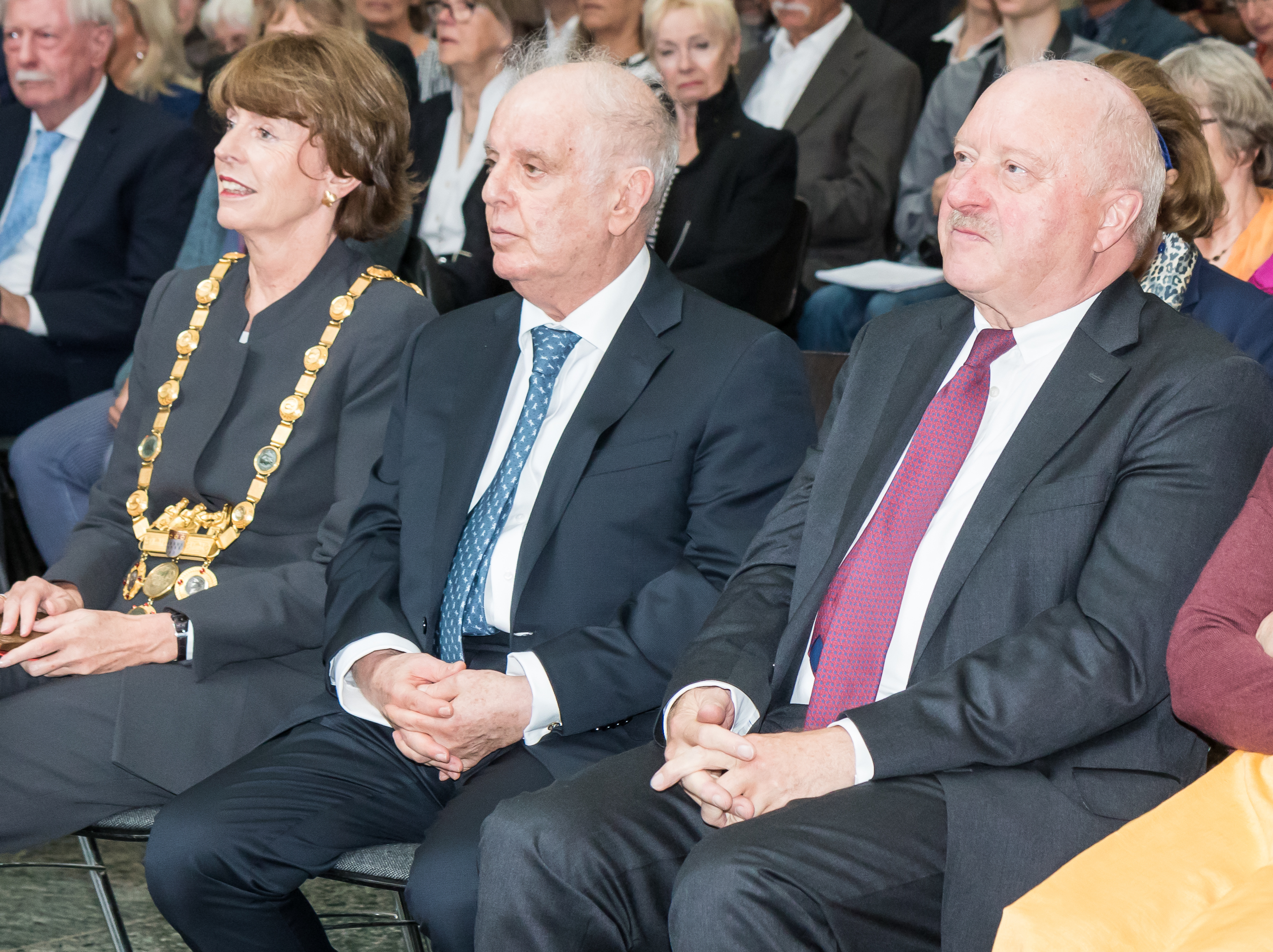 Verleihung Konrad-Adenauer-Preis der Stadt Köln 2019 an Daniel Barenboim